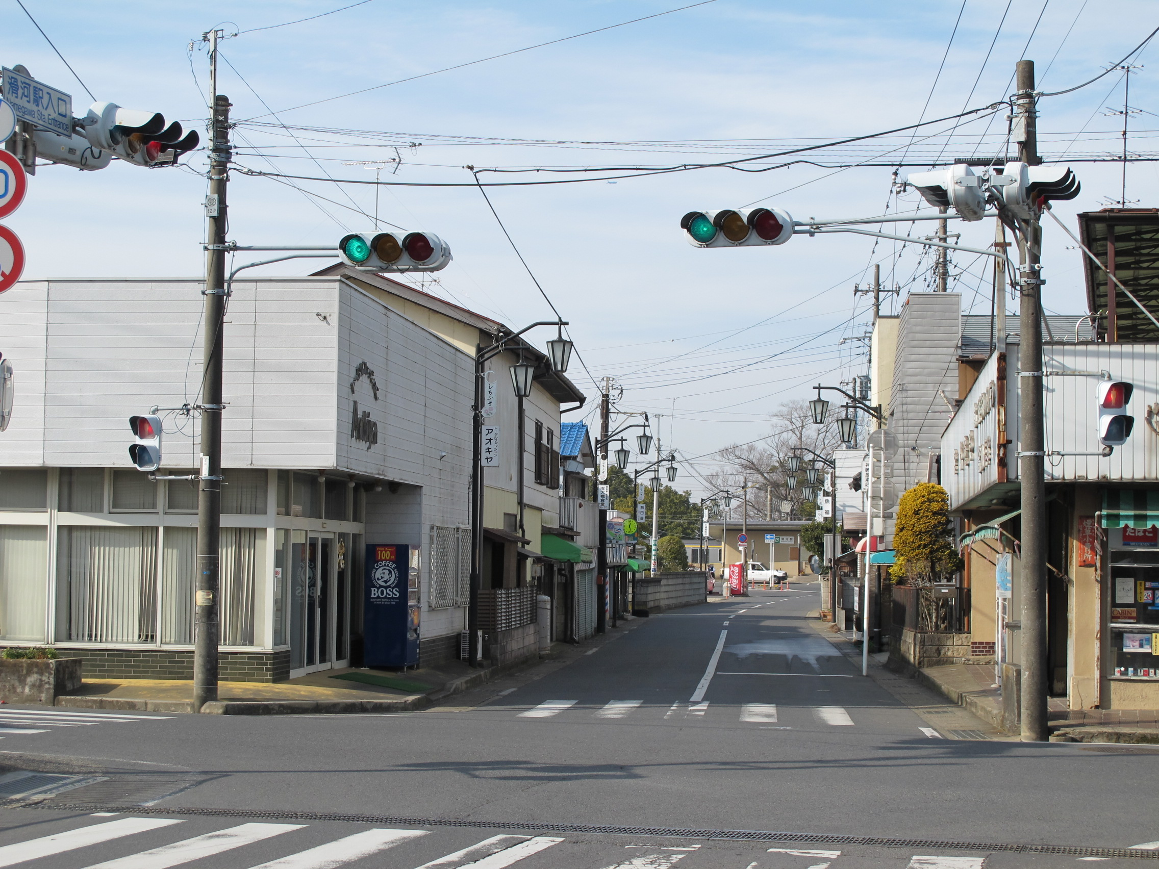 千葉県道207号・滑川停車場線（滑川駅入口）